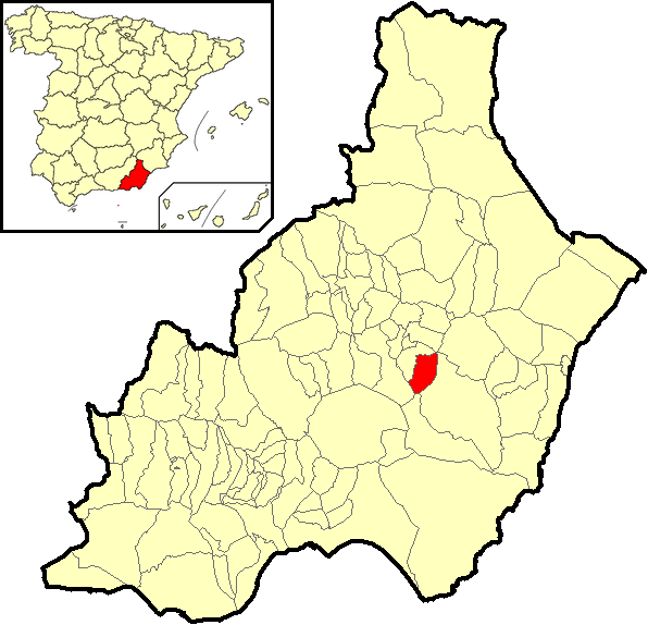 Situación del término municipal de Uleila del Campo respecto a la provincia de Almería, en España.